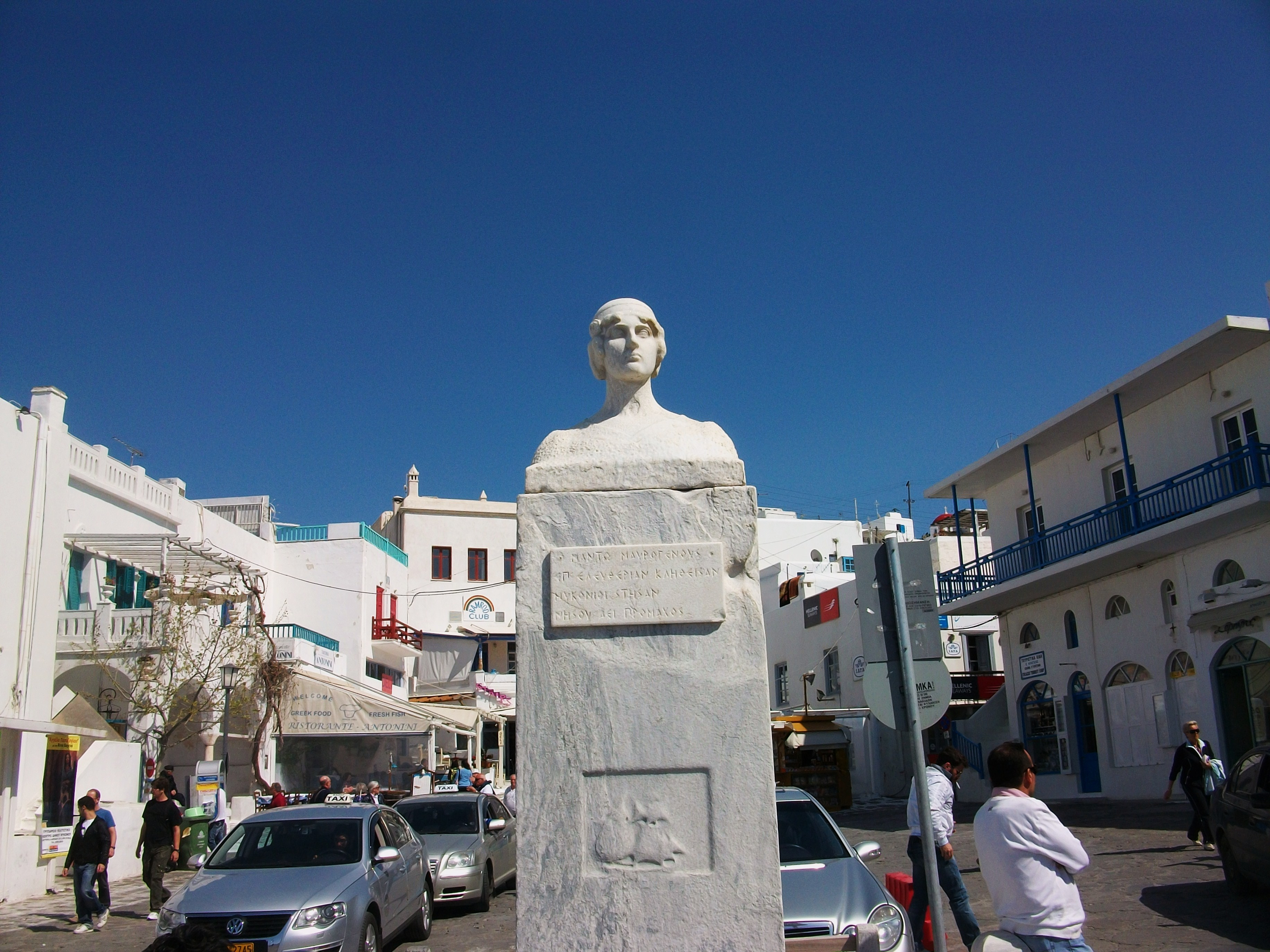 Monument a Míkonos.